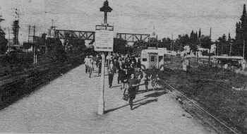 Estación San Antonio de Padua en 1950, Provincia de Buenos Aires.